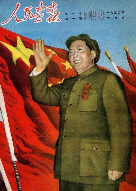 中文（中国大陆）: 1950年创刊号的封面，为毛泽东肖像。